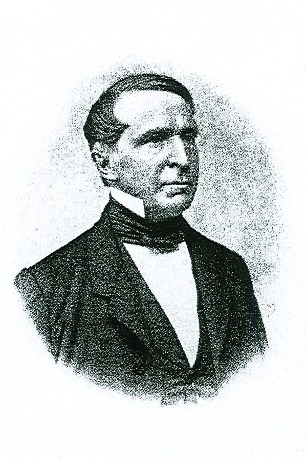 Porträt Gustav Scharlach (1811-1881), Geheimer Regierungsrat und Amtshauptmann in Münden.